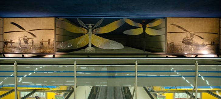 Mural triple en la estación Juan de la Cierva del metro de Madrid: cuerpo central de acero cortado al chorro de arena y cuerpos laterales de cerámica con material fotográfico de la Fuundación Juan de la Cierva. Proyecto y realización del ceramista Carlos Alonso y Luis Sardá (Estudio Sardá de Diseño, Ures, Guadalajara, España).